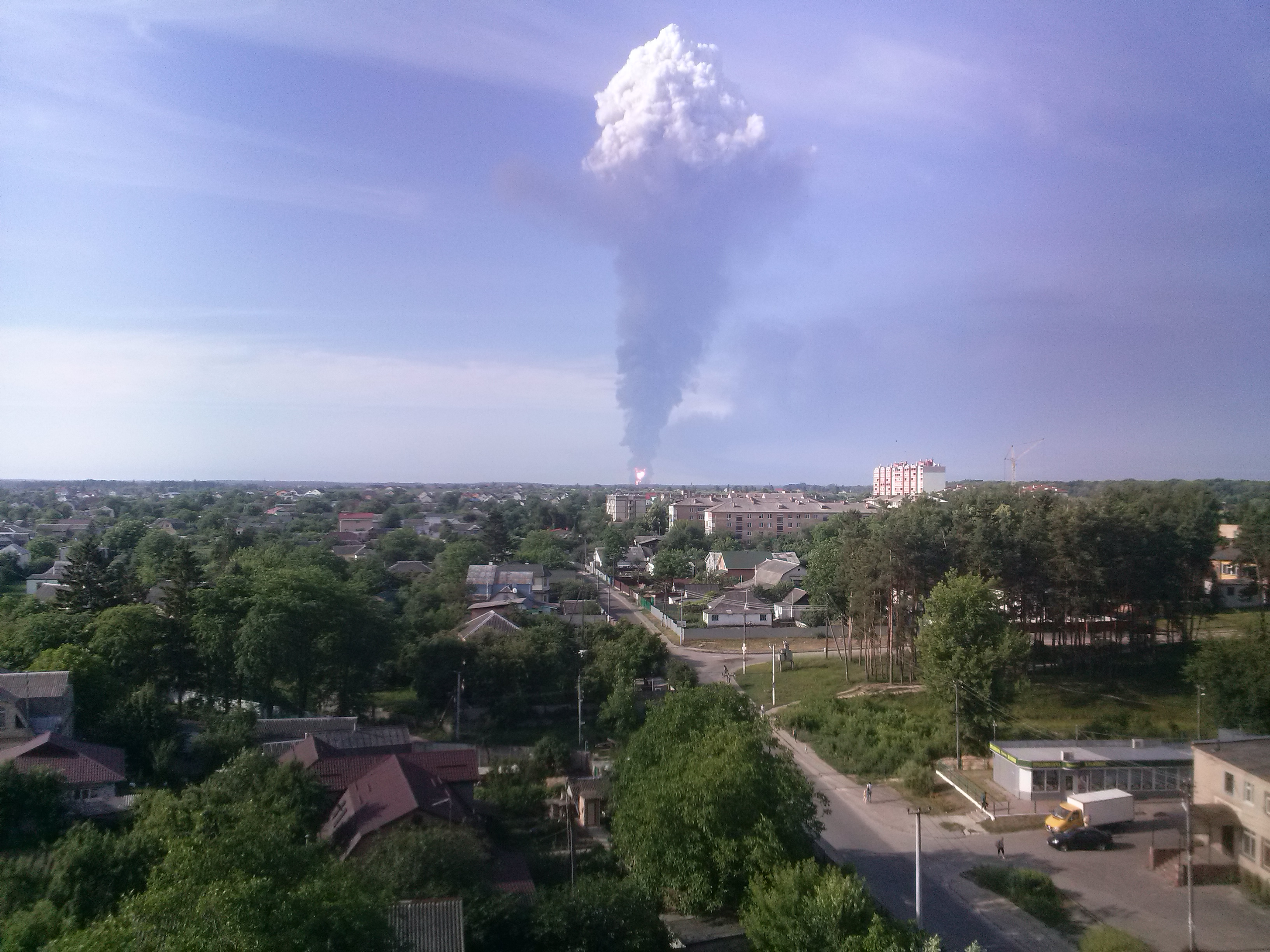 Пожежа на нафтобазі біля Крячок уранці 9.06.2015